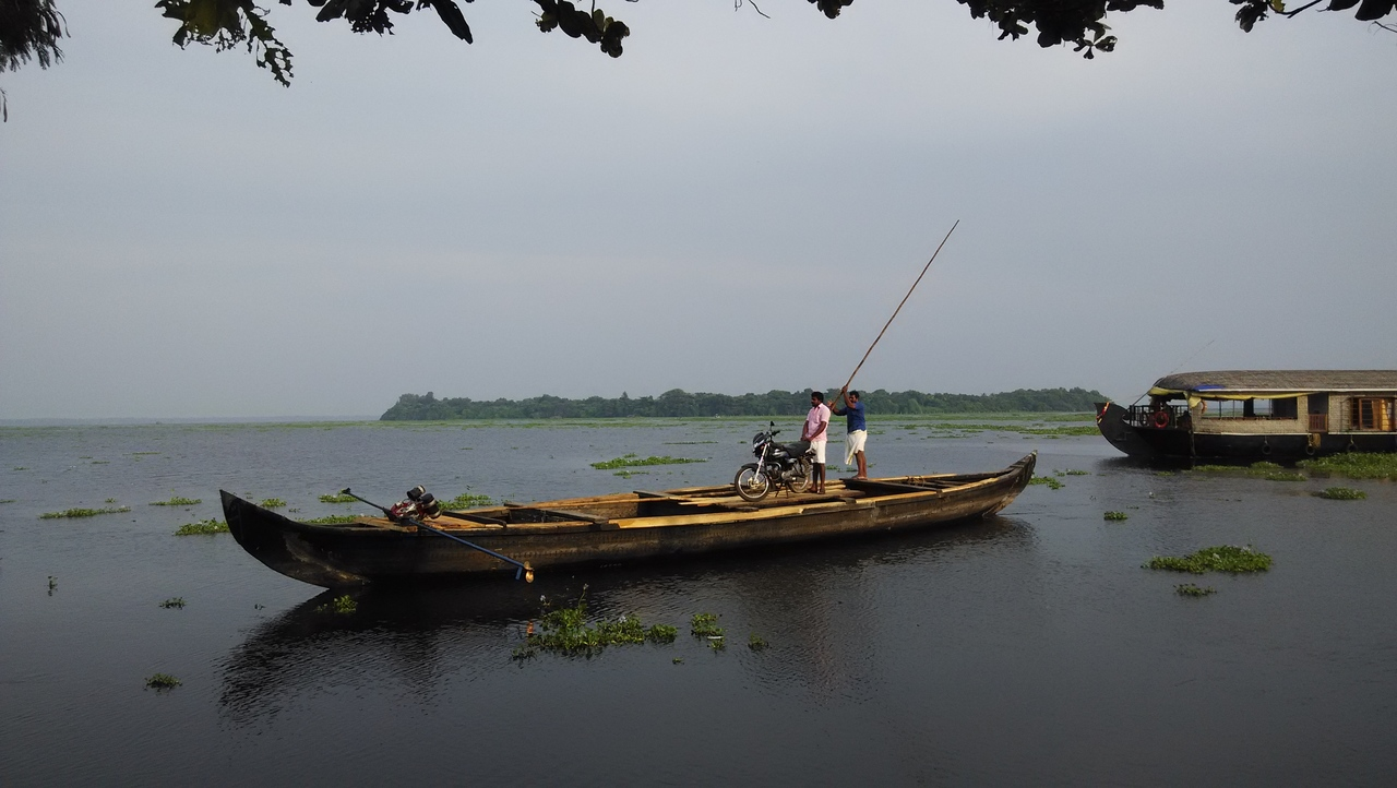 പാതിരാമണല്‍ ദ്വീപ് - മുഹമ്മ കടവില്‍നിന്നുമുള്ള വീക്ഷണം.